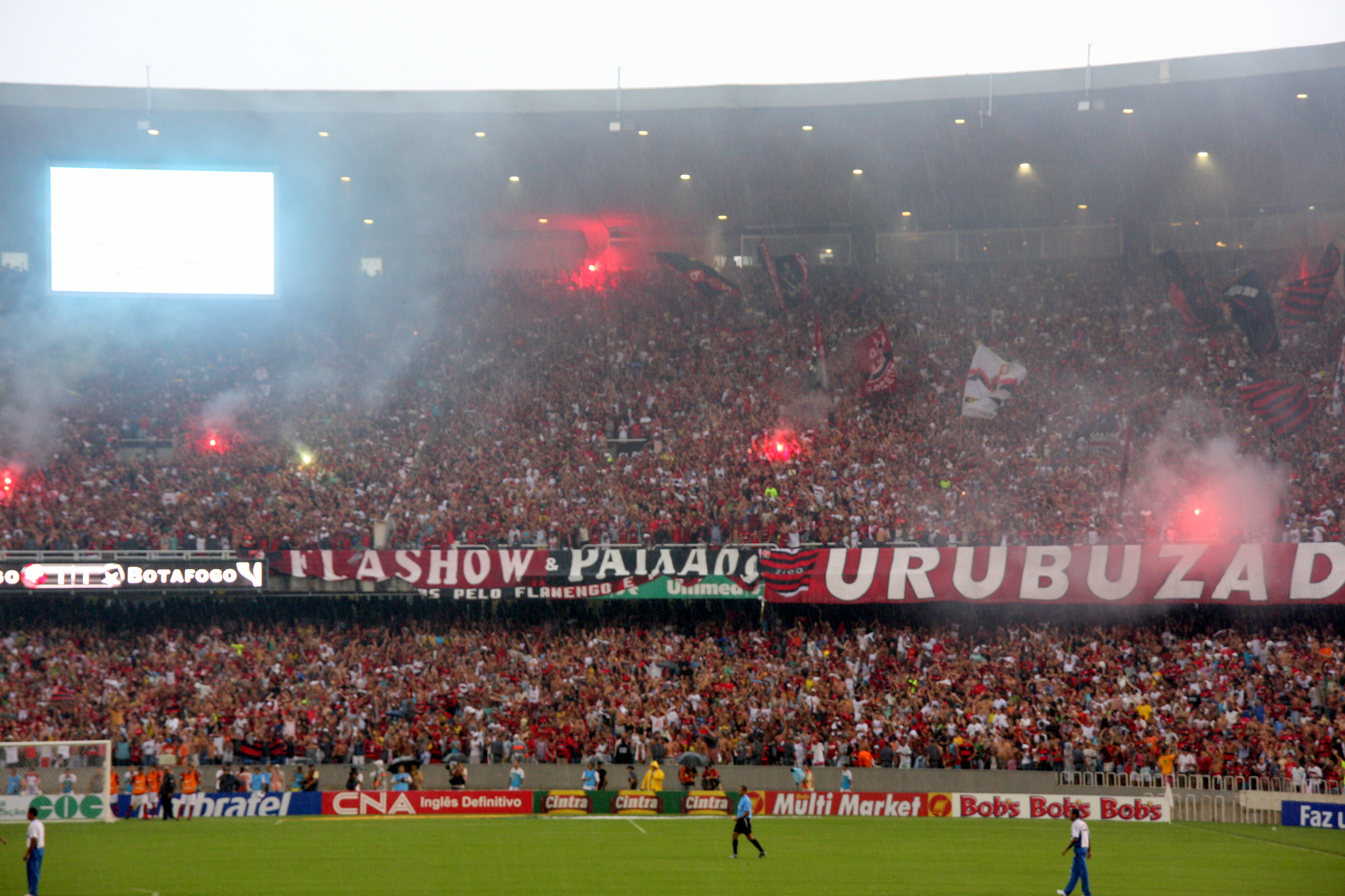 Flamengo 2 - Botafogo 1. Final da Taça Guanabara de 2008.